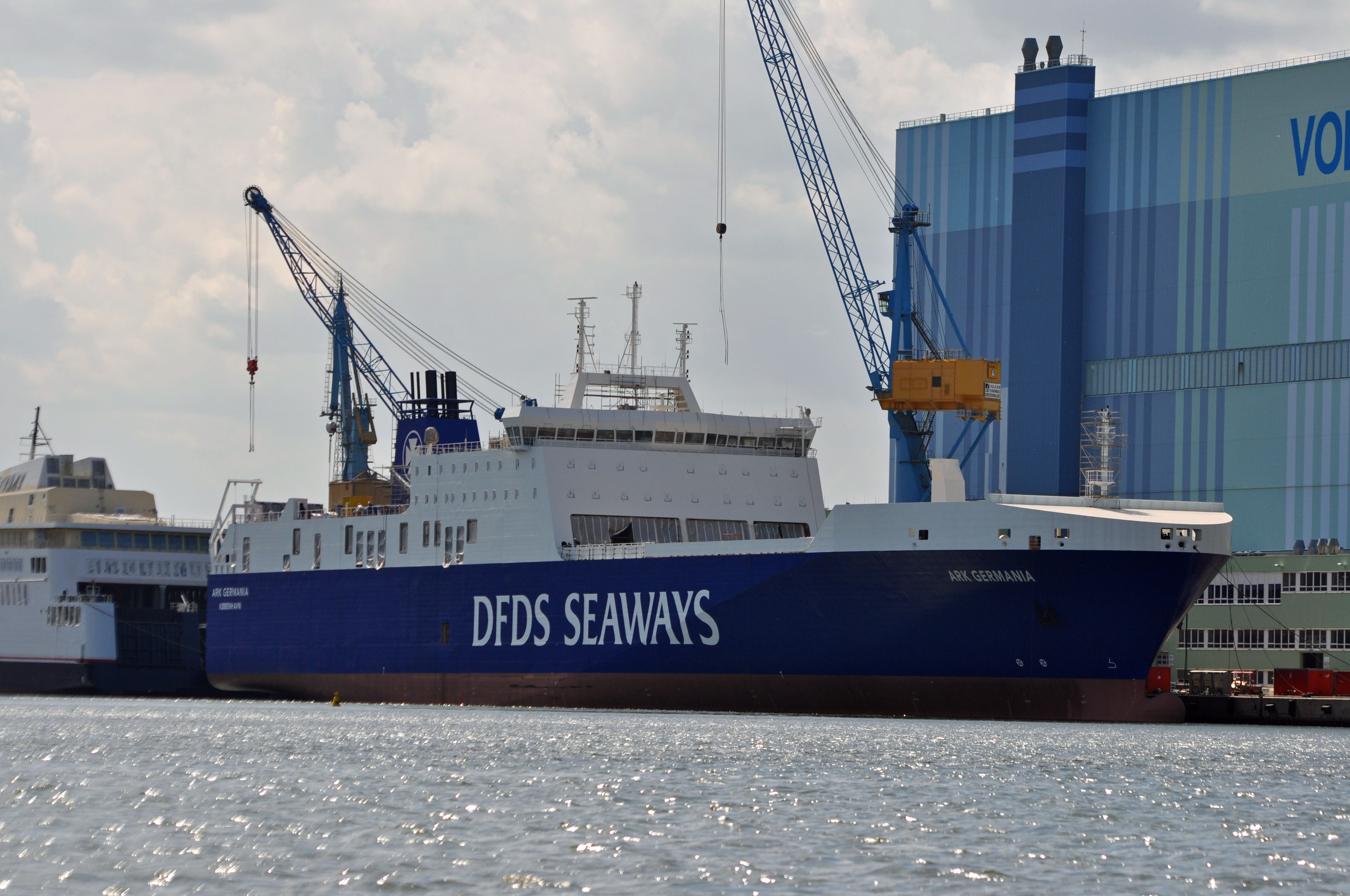 Schiffe am Ausrüstungskai der Volkswerft Stralsund; Details siehe Dateiname. Fotografiert am 30. Juli 2013 vom Gelände des Nautineums Stralsund auf dem zu Stralsund gehörenden Dänholm. IMO 9609952; als ARK GERMANIA von der Reederei DFDS bestelltes Fährschiff im Juli 2013 vor der Volkswerft Stralsund.